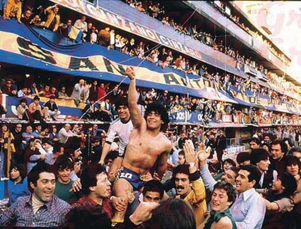 Diego Maradona celebrando la obtención del Torneo Metropolitano de 1981 en La Bombonera